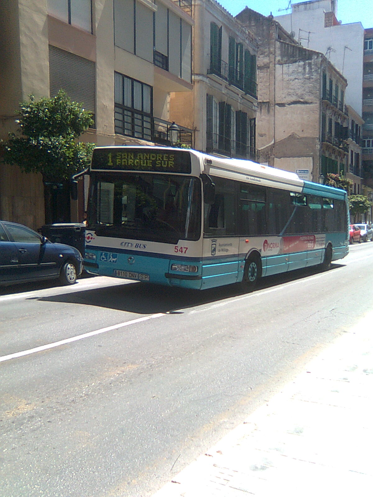 Bus de la línea 1 de la EMT en su recorrido por la calle Victoria.